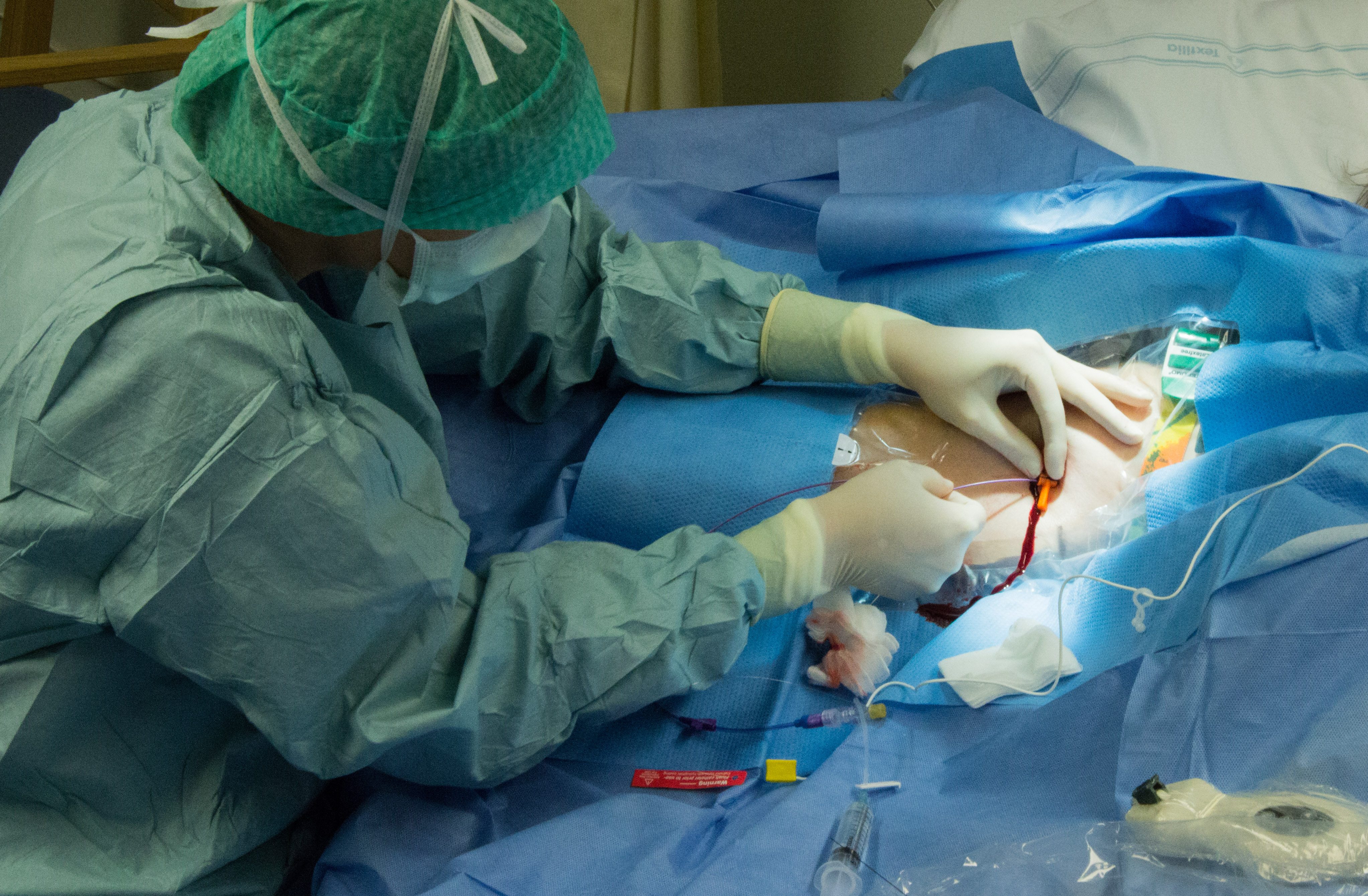 Sjuksköterska som lägger in PICC sterilt